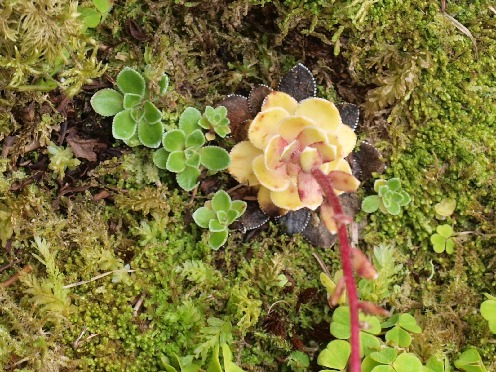 Rosett av avblomstra bergfrue med nye planter frå vegitativ formeiring tidlegare år.